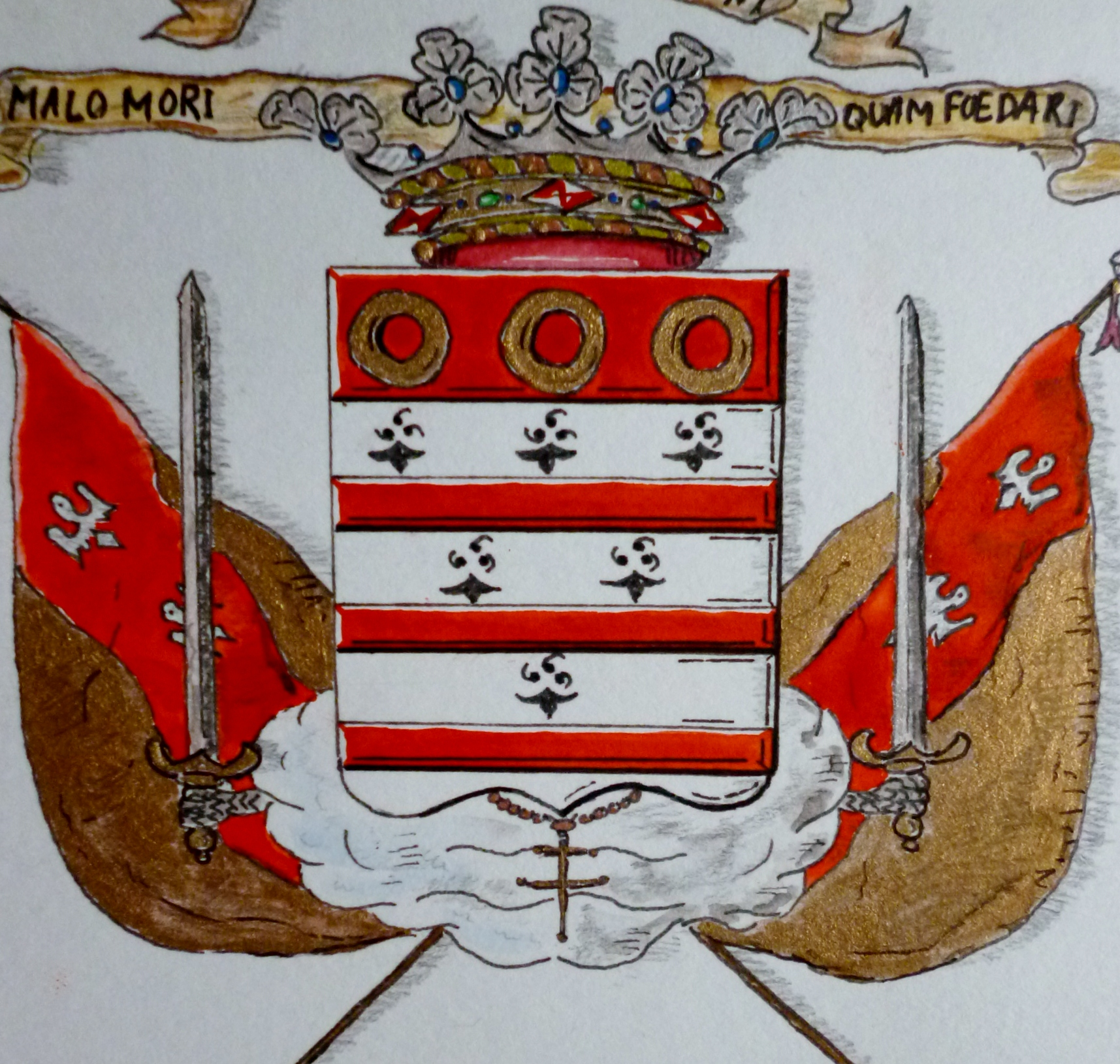 blason